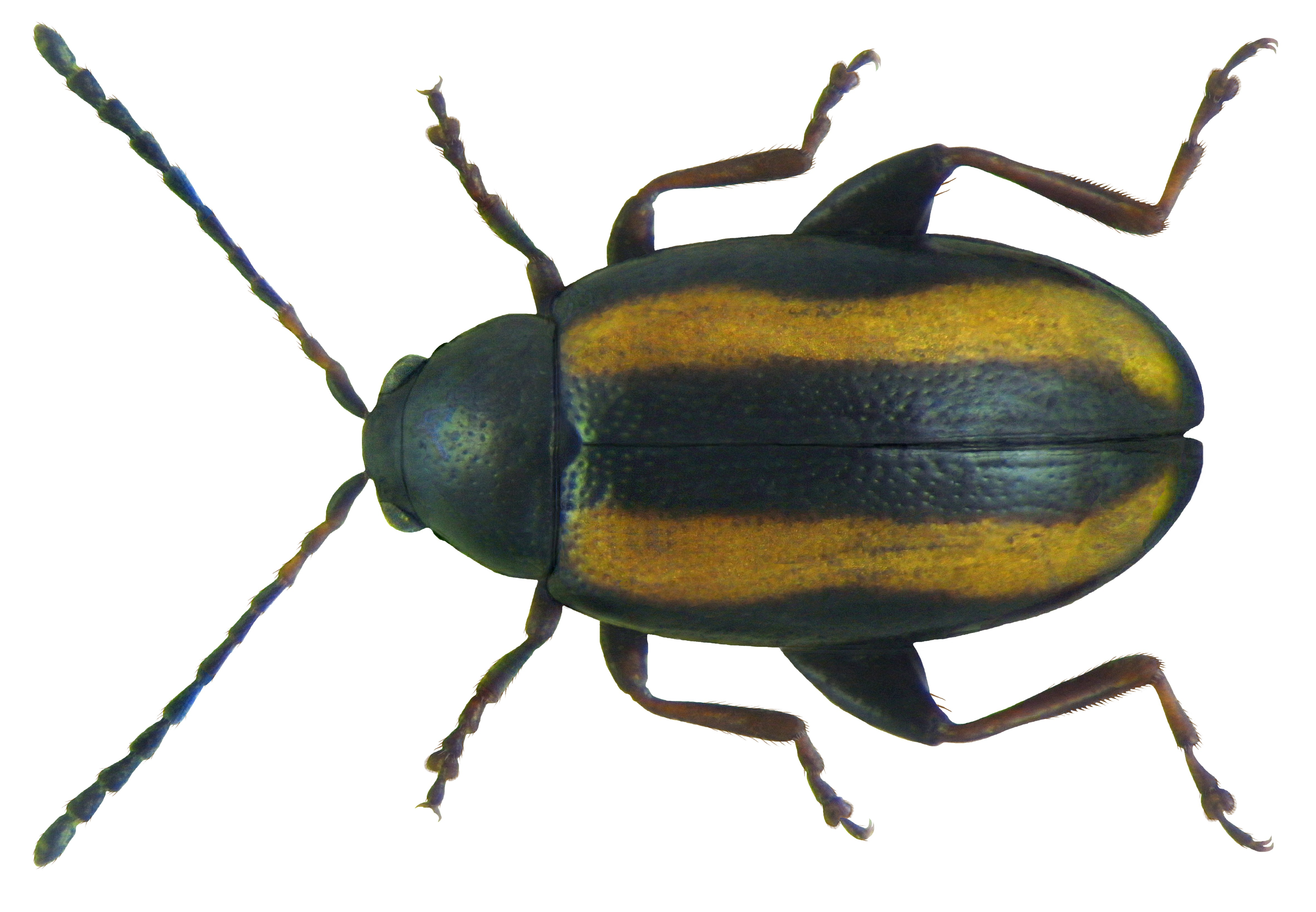 Phyllotreta nemorum (Linné, 1758) Familie: Chrysomelidae Groesse: 2,5-3,0 mm Verbreitung: Europa Oekologie: an Cruciferen Fundort: Germania, Bayern, Oberfranken, Kulmbach leg.det. U.Schmidt, 1972 Photo: U.Schmidt, 2011